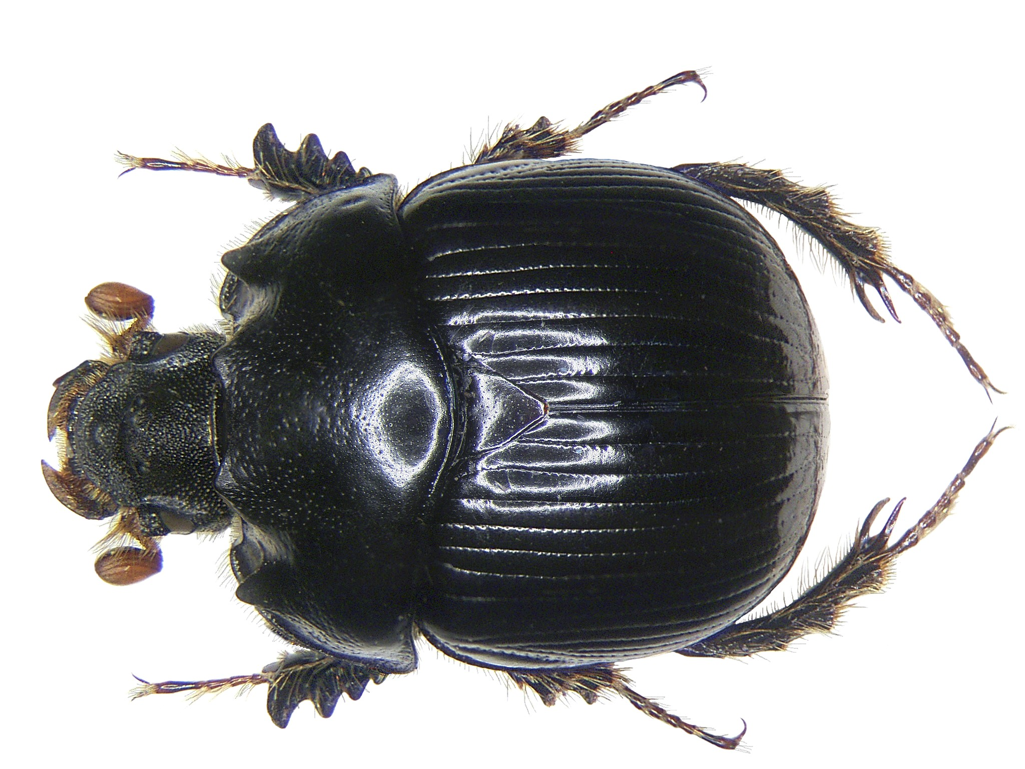 Familie: Scarabaeidae Grösse: 10-15 mm Verbreitung: Nordafrika, Spanien Fundort: Espana leg. H.Hechelmann; det. U.Schmidt Foto: U.Schmidt, 2007